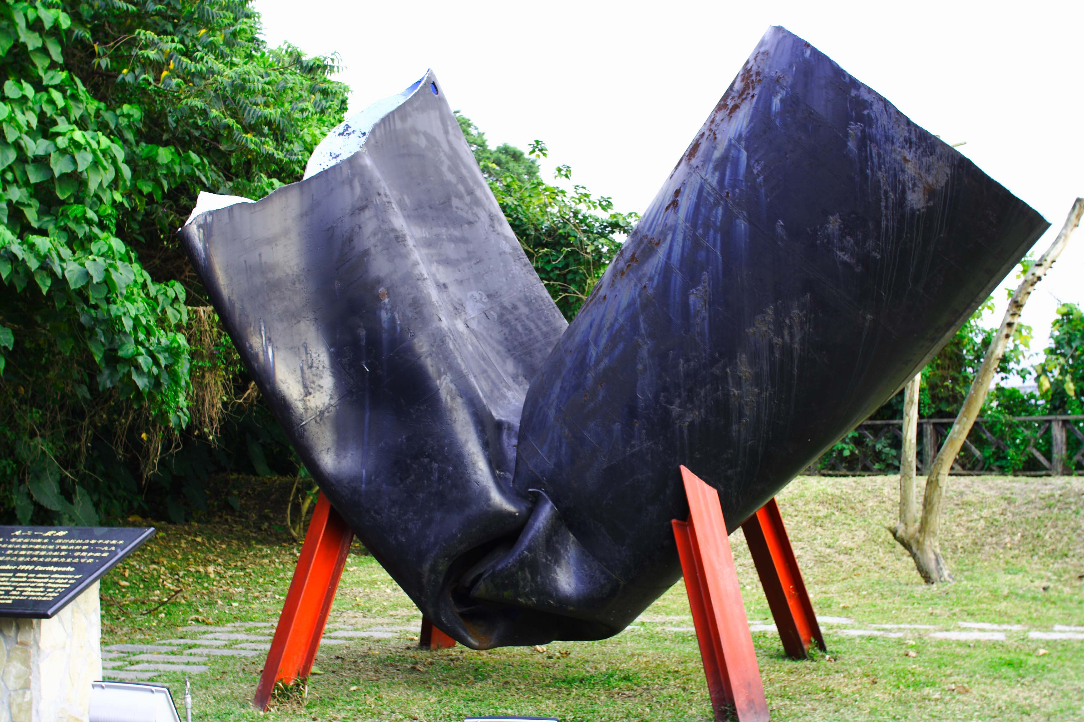 九二一震撼：本鋼管口徑200釐米，管壁厚度為1.8釐米，設計抗拉力為41公斤/平方釐米，原埋設於台中縣豐原給水廠之地下輸水幹管，大地震當時，整支鋼管遭受強大拉力，導致如此變形，足見當時地震之威力，攝於自來水博物館。